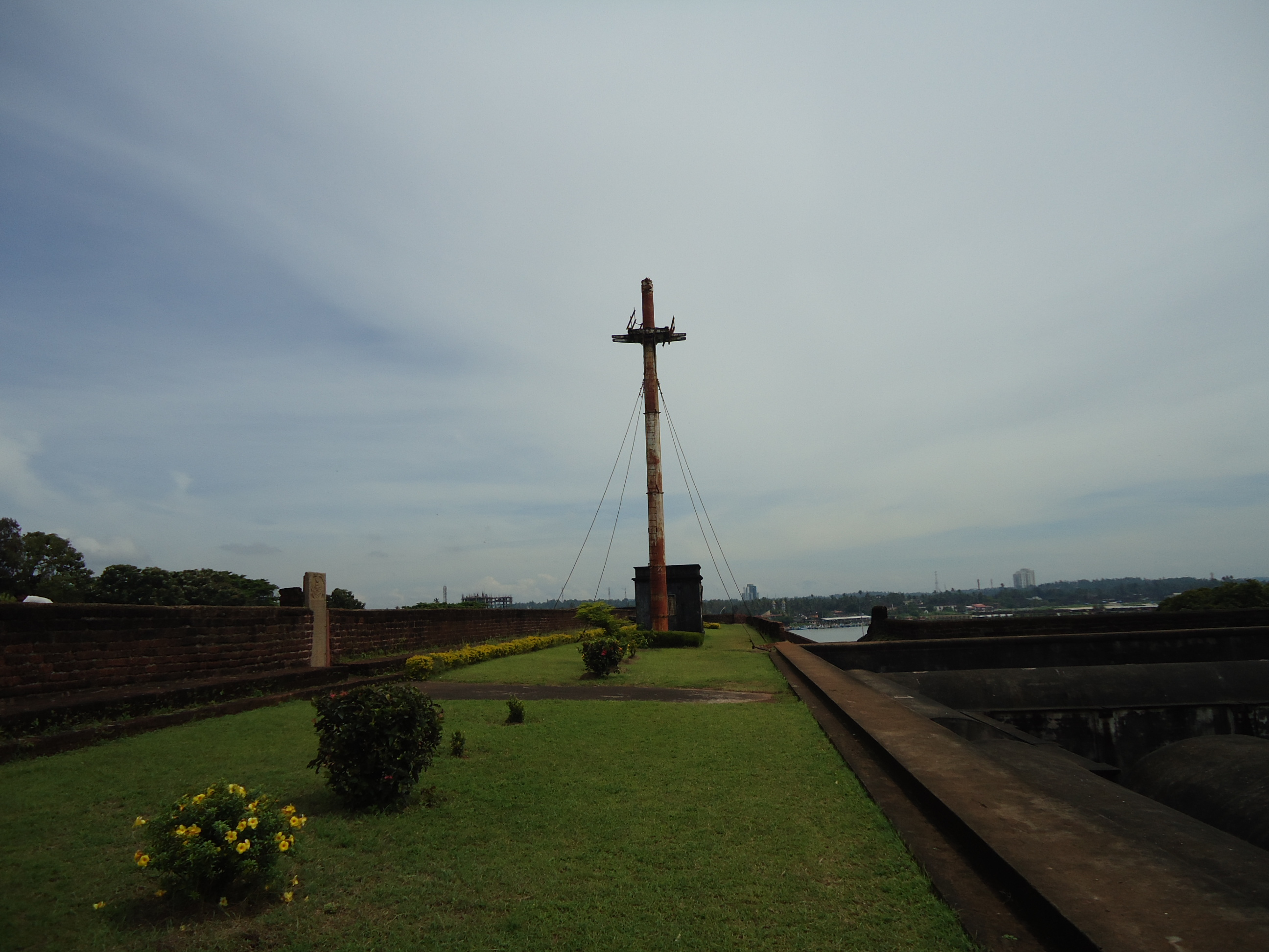 കണ്ണൂർകോട്ടയുടെ മുകളിലെ കൊടിമരം